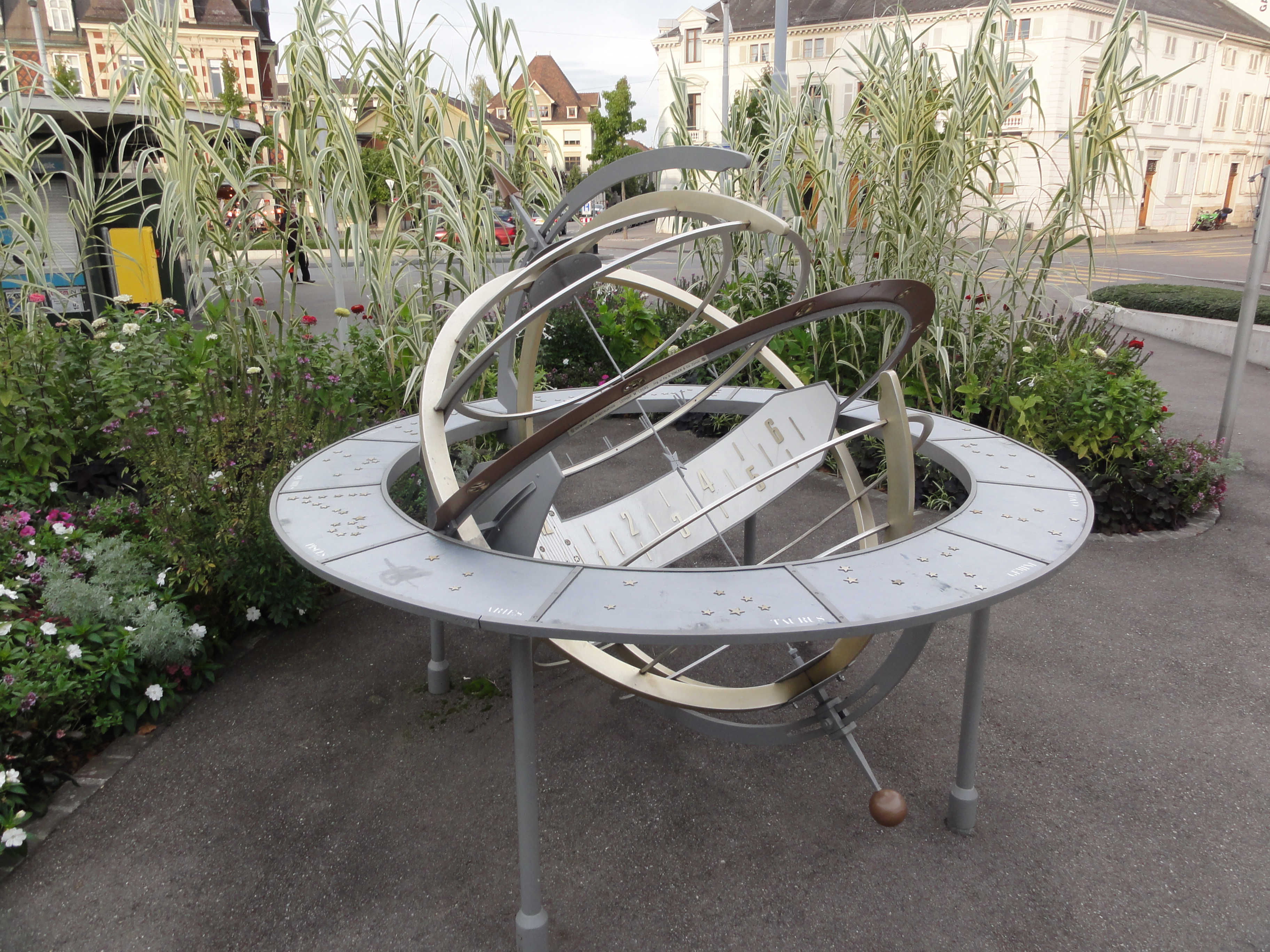 Basel — Wettsteinplatz (mittig)